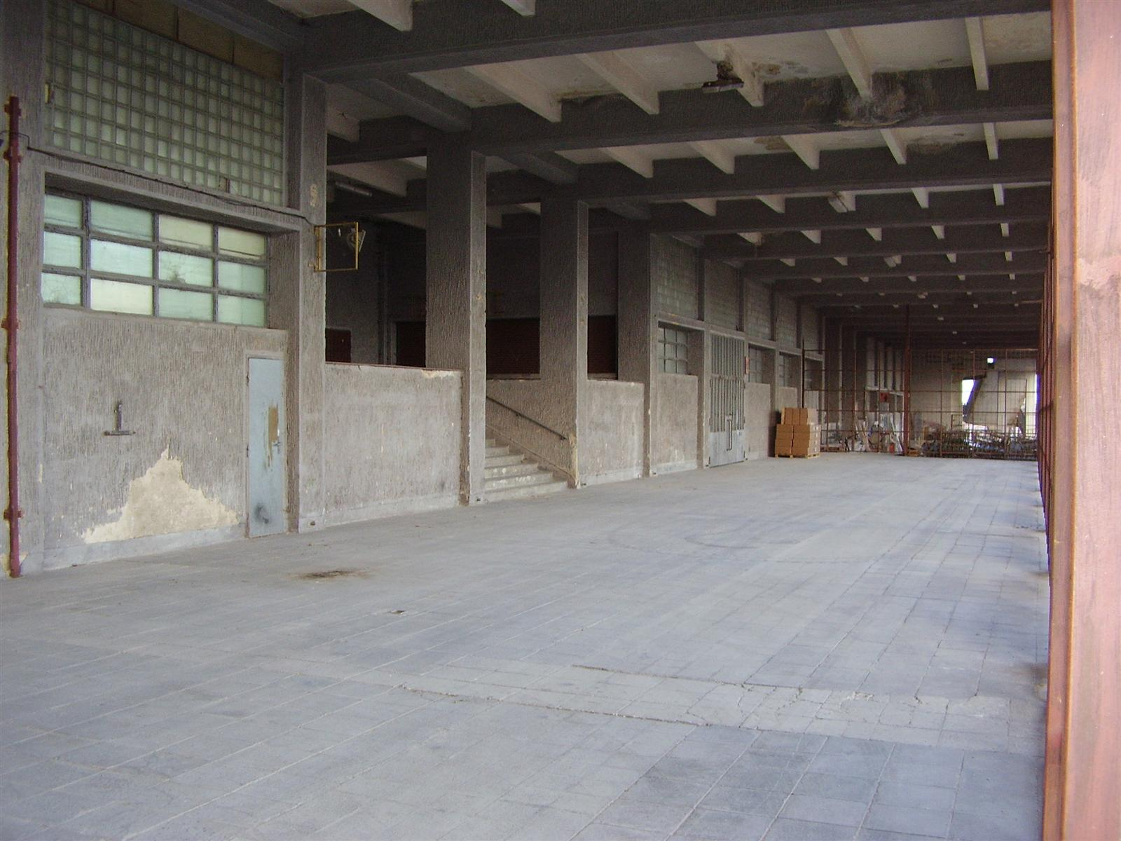 Velkéhý strahovský stadion, chátrající a sloužící jako sklad